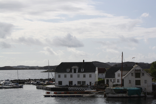 Glesnes